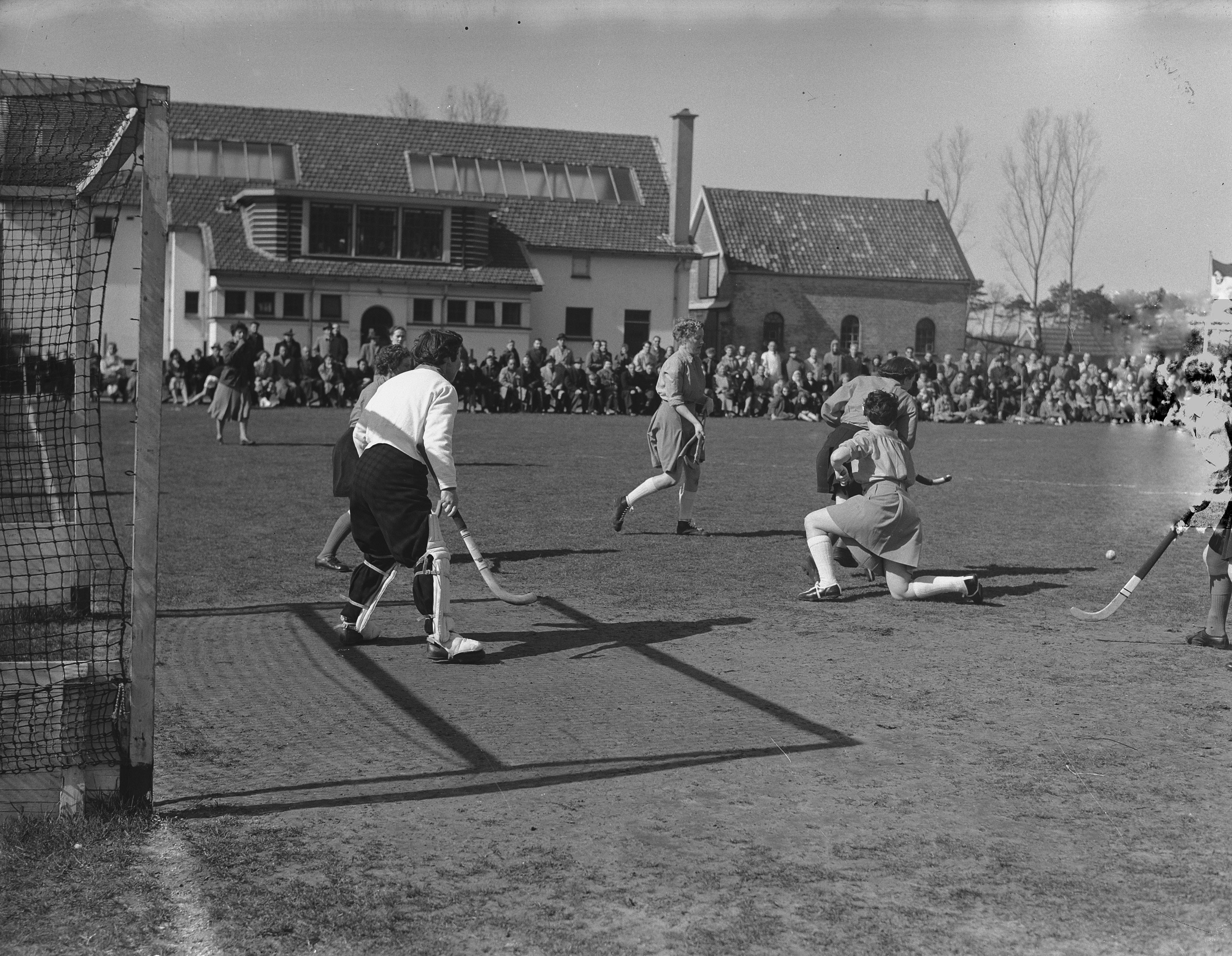 Collectie / Archief : Fotocollectie Anefo Reportage / Serie : [ onbekend ] Beschrijving : Dames hockey Den Haag Nederland tegen Wales 2-0 Datum : 17 april 1954 Locatie : Den Haag, Wales Trefwoorden : hockey Fotograaf : Duinen, […] van / Anefo Auteursrechthebbende : Nationaal Archief Materiaalsoort : Glasnegatief Nummer archiefinventaris : bekijk toegang 2.24.01.09 Bestanddeelnummer : 906-4039